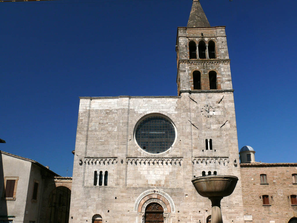 Bevagna, San Michele Arcangelo, church